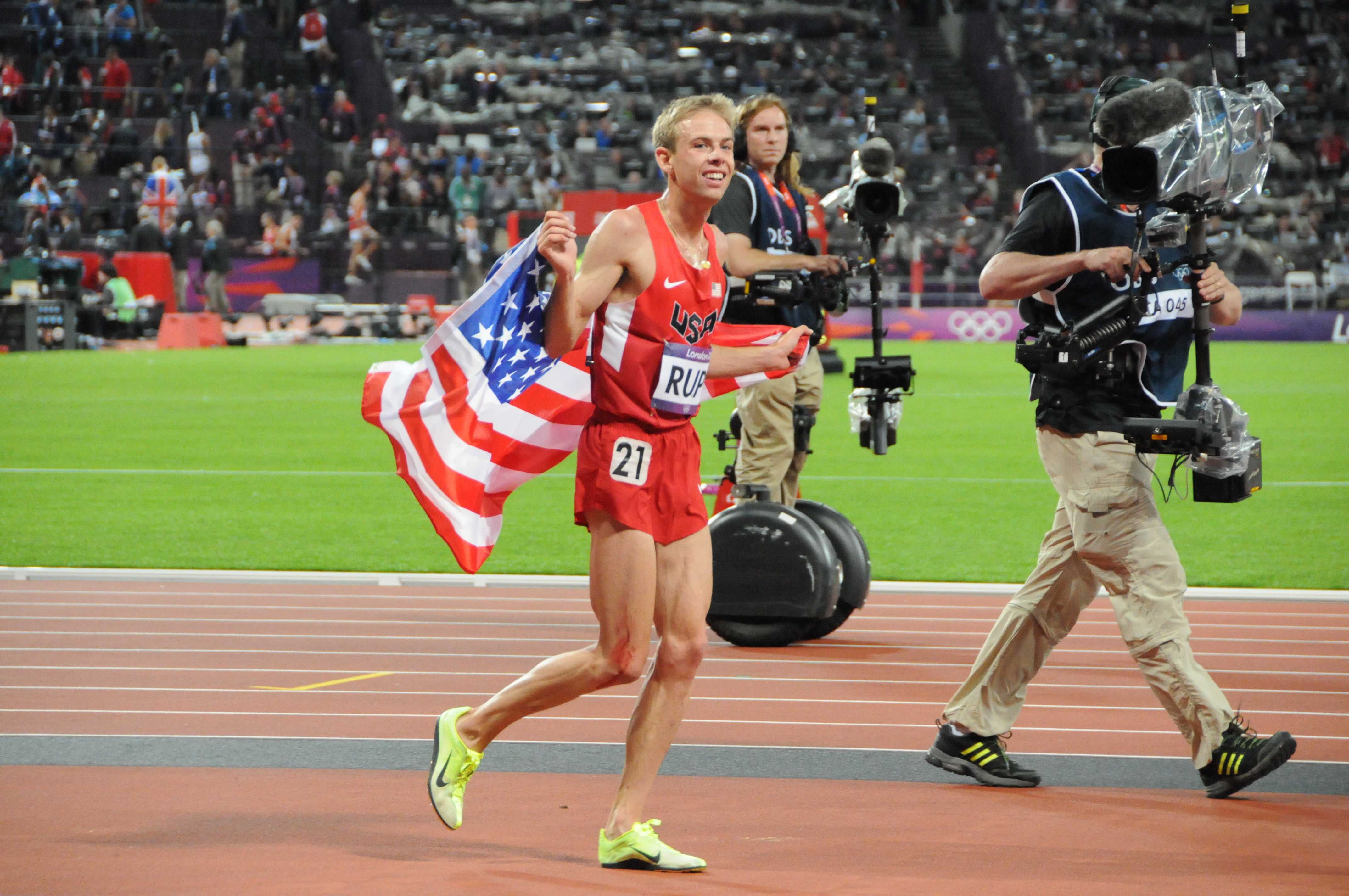 L'athléte RUPP Galen célébrant sa médaille d'rgent dans la course du 10000 m au stade olympique de Londres